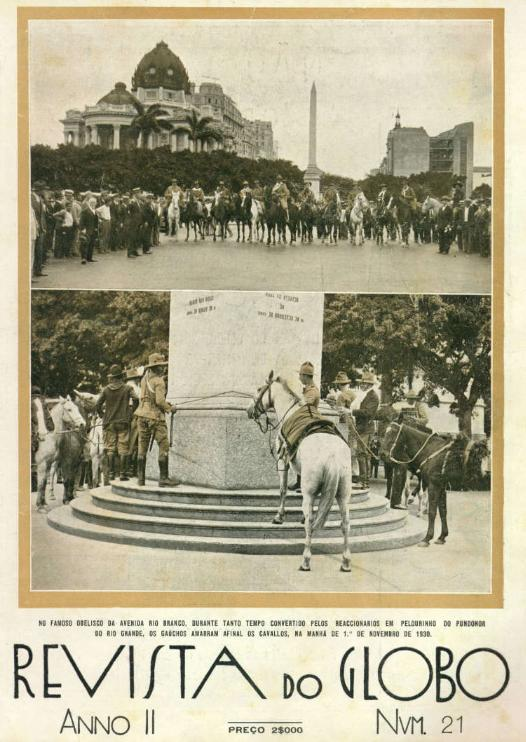 Capa da Revista do Globo sobre a vitória da Revolução de 1930. Nela aparece os gaúchos amarrando os seus cavalos no obelisco da Avenida Rio Branco, no Rio de Janeiro, então Capital Federal.